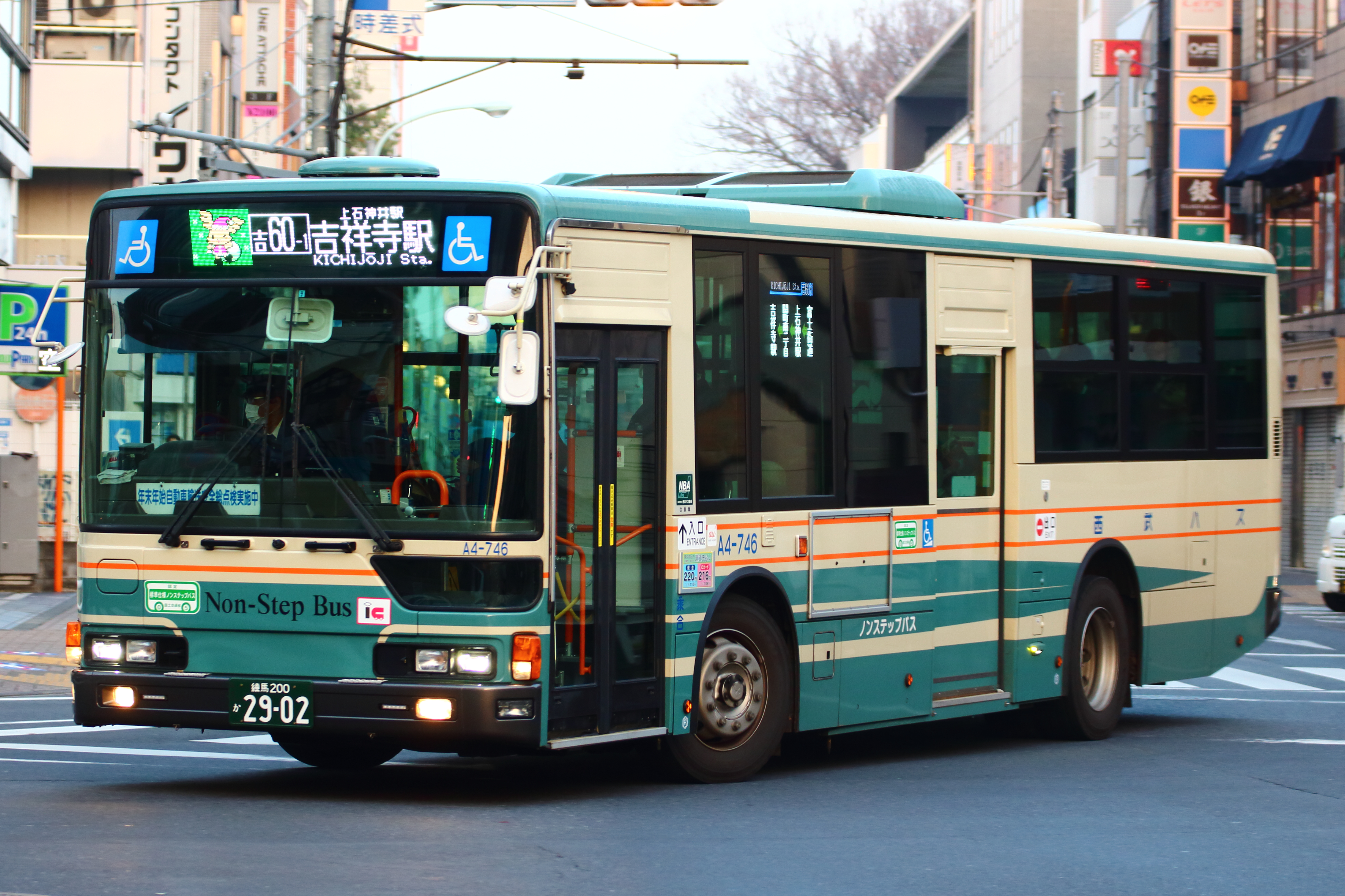 フルカラーLED搭載のエアロスター